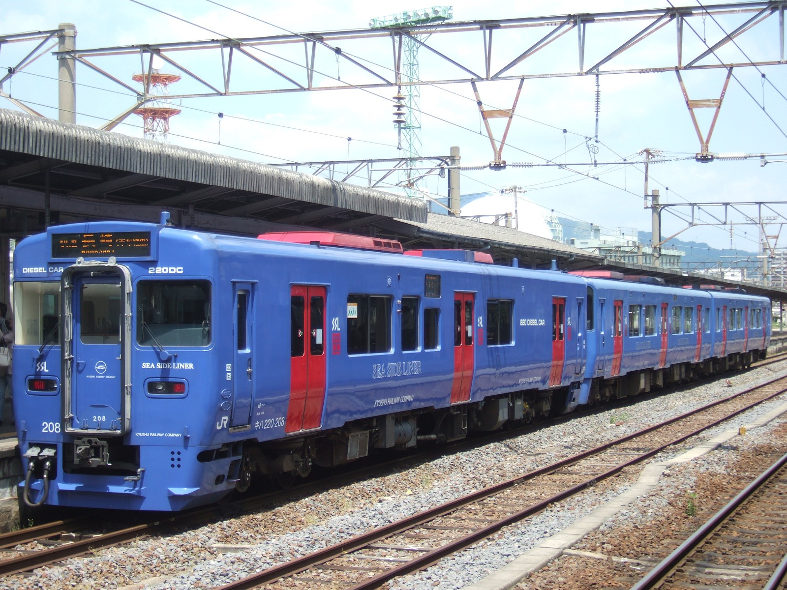 JR九州長崎本線・大村線・佐世保線快速「シーサイドライナー」、キハ220形増結のキハ200系気動車による3両編成。長崎駅にて撮影。